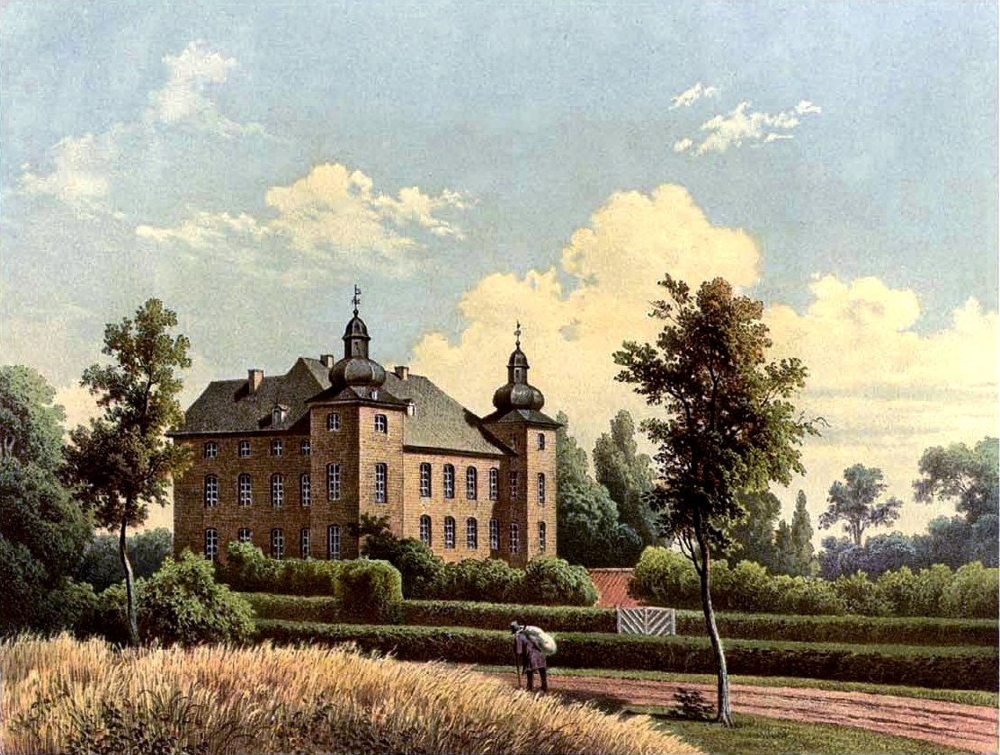 Haus Wohnung, Lithografie aus dem 19. Jahrhundert